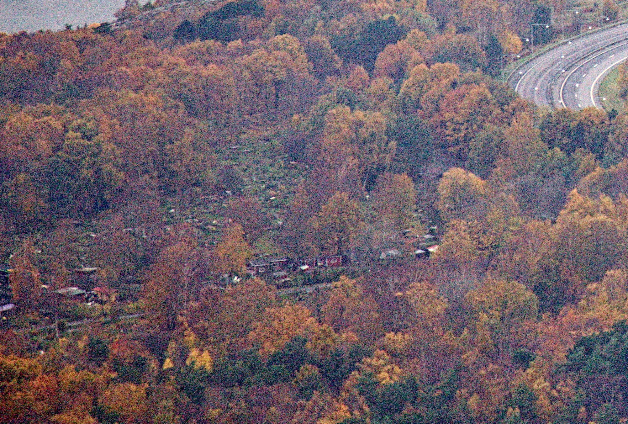 Sjöbergens koloniområde i västra Göteborg. Påfart till Älvsborgsbron syns till höger, Göta älv uppe till vänster. Datum är 27 augusti 2013, och skogen i Sjöbergen är klädd i höstfärger.